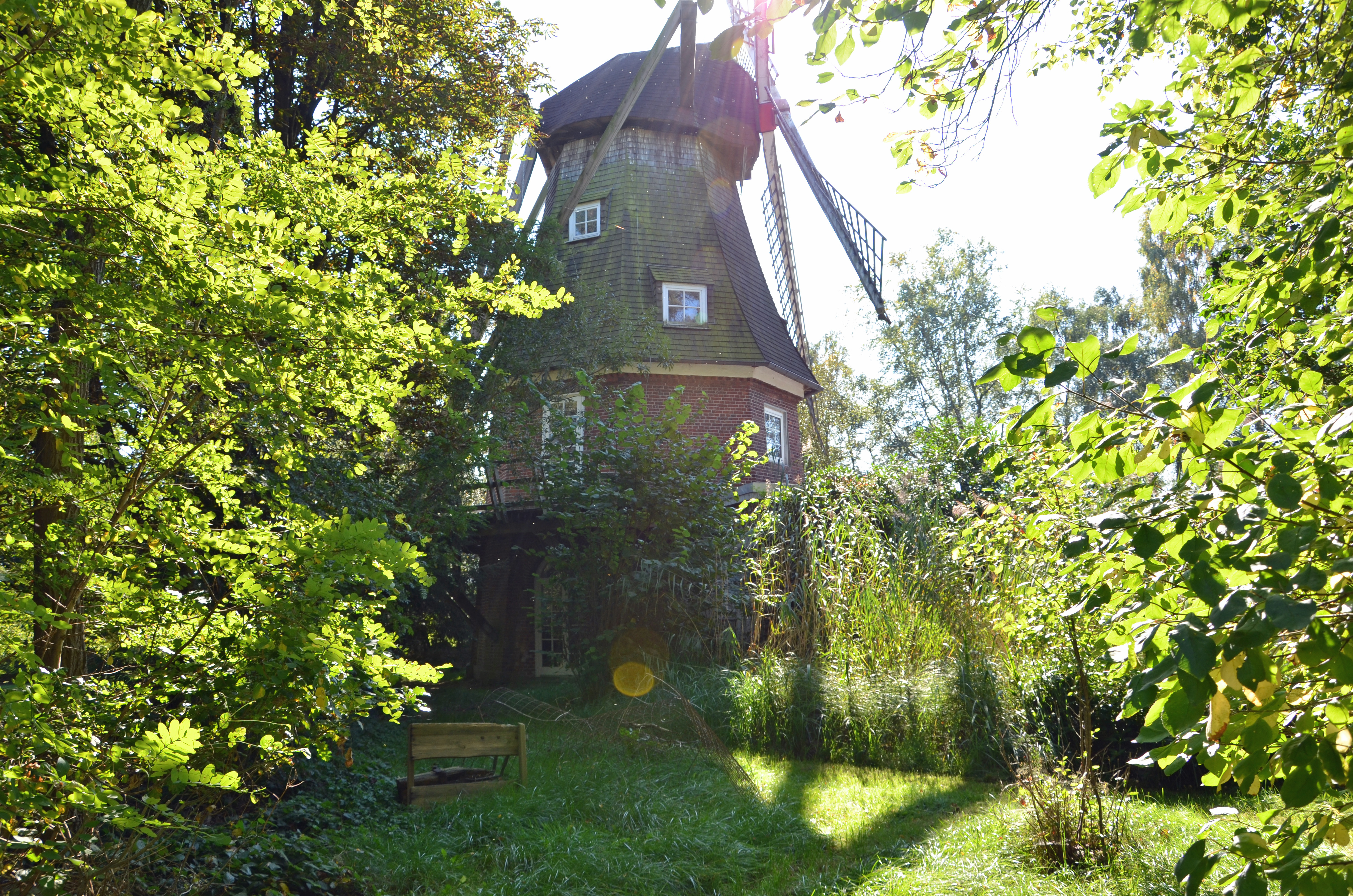 Bassum Baudenkmal Windmühle Kätingen